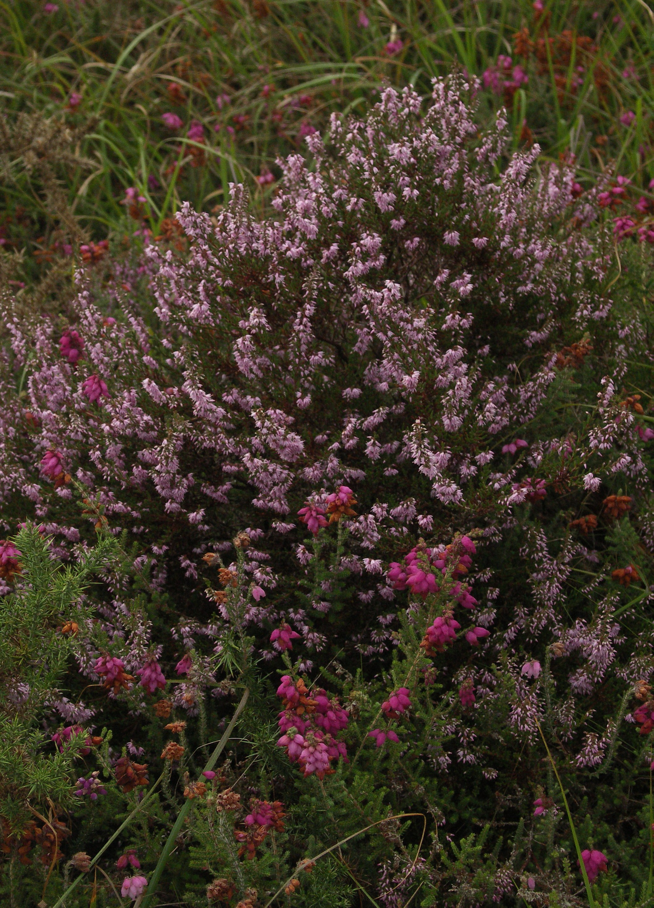 Bruyère en fleurs à Botmeur dans les Monts d'Arrée